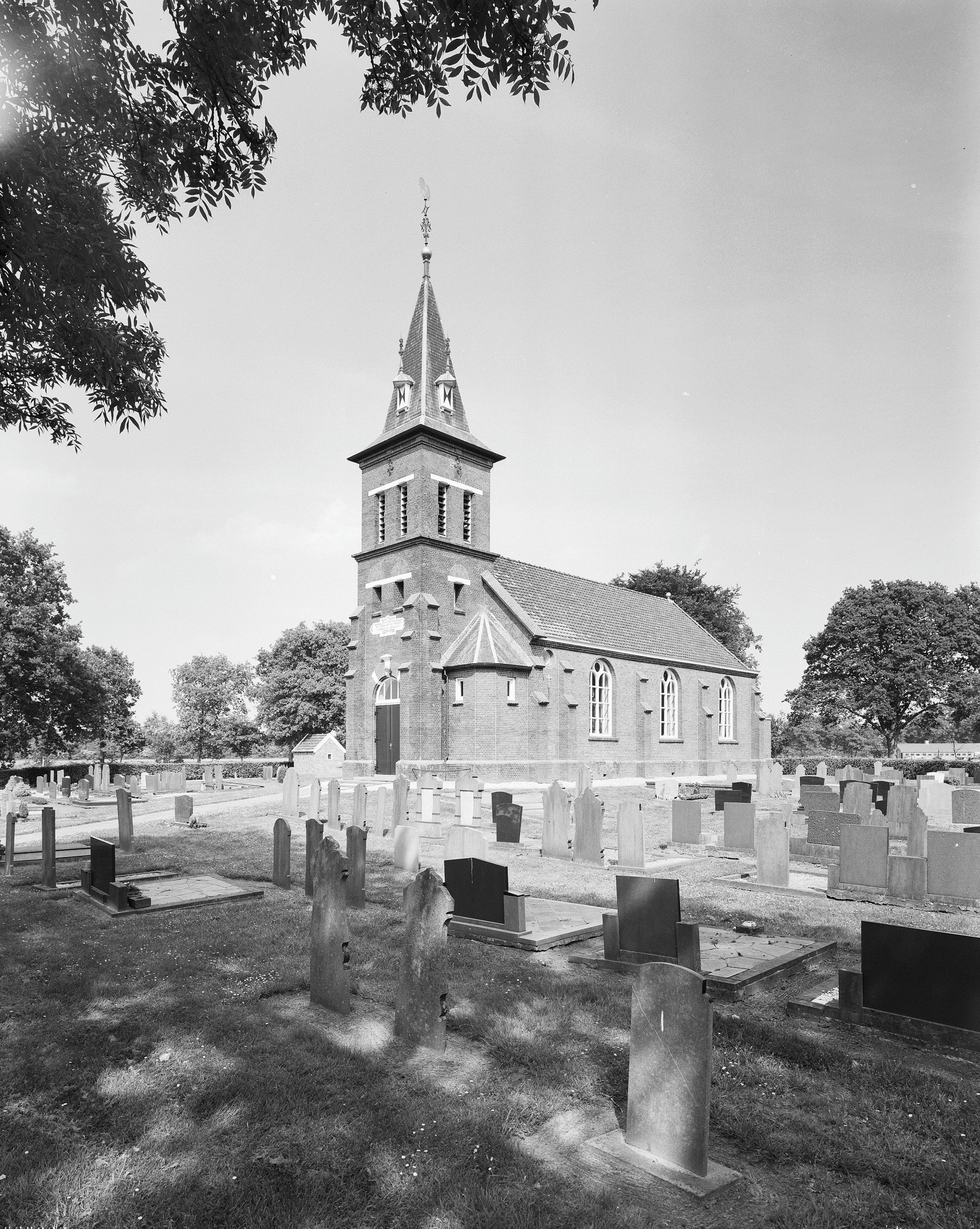 Protestantse Kerk: Overzicht zuidwestgevel met kerktoren en kerkhof (opmerking: Gefotografeerd voor Monumenten In Nederland Friesland, bladzijde 256)